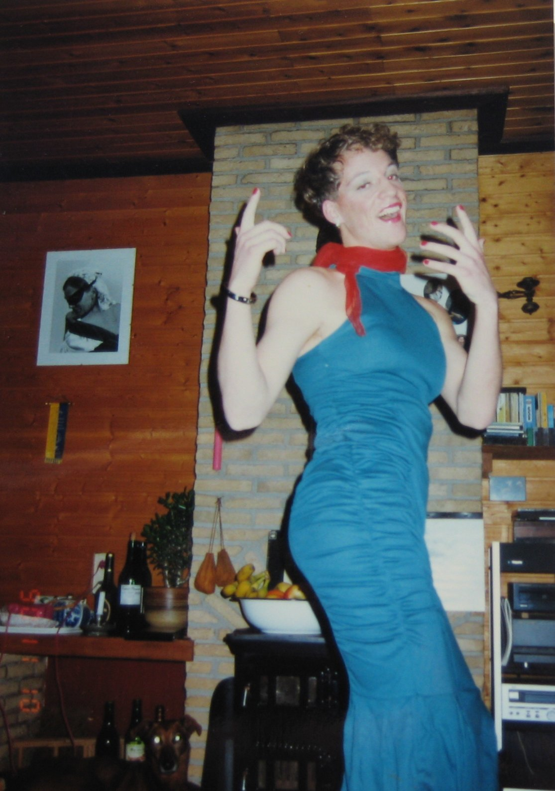 Een Travestiet